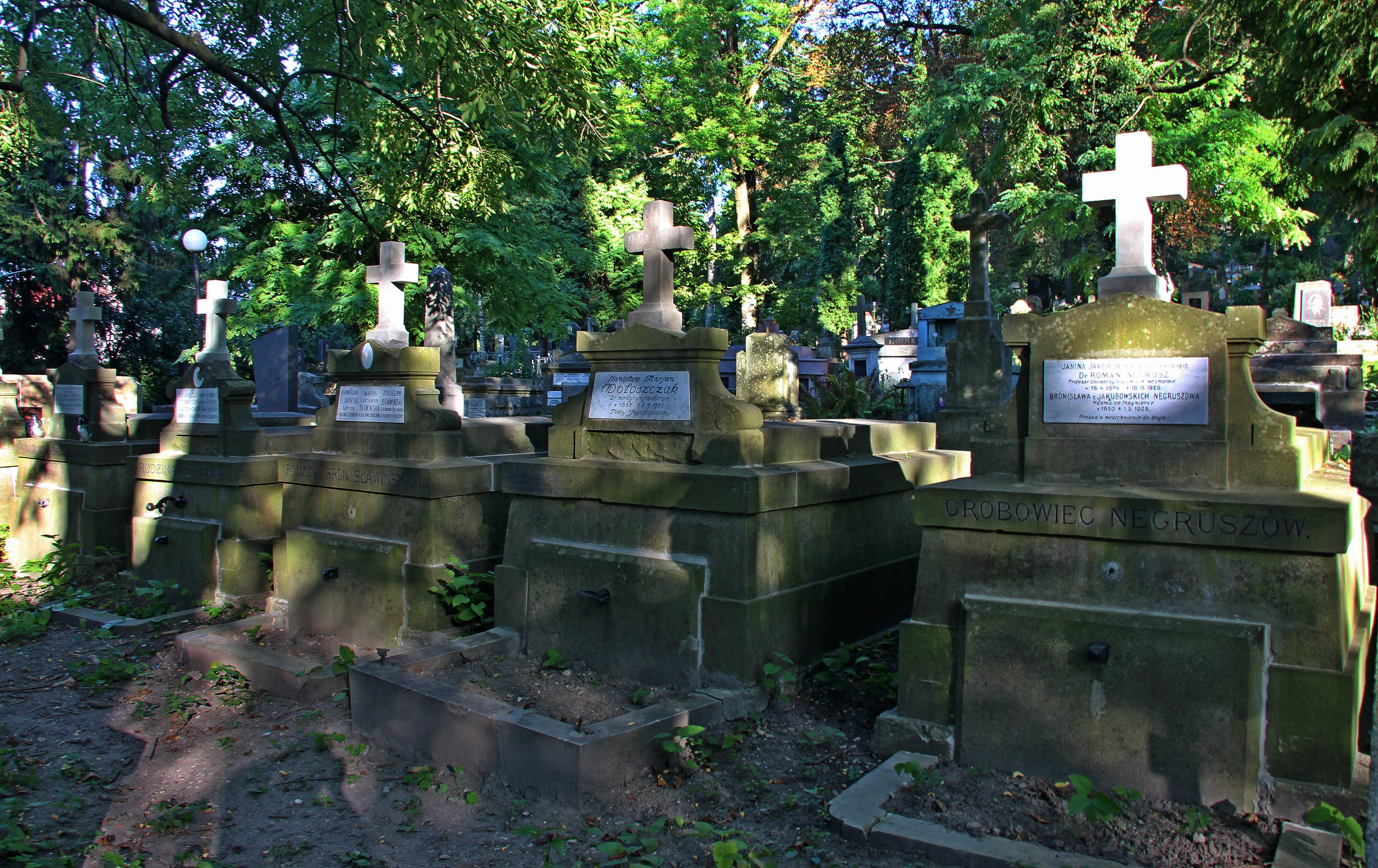 Гробниця родини Негруш.Личаківський цвинтар , поле № 59.